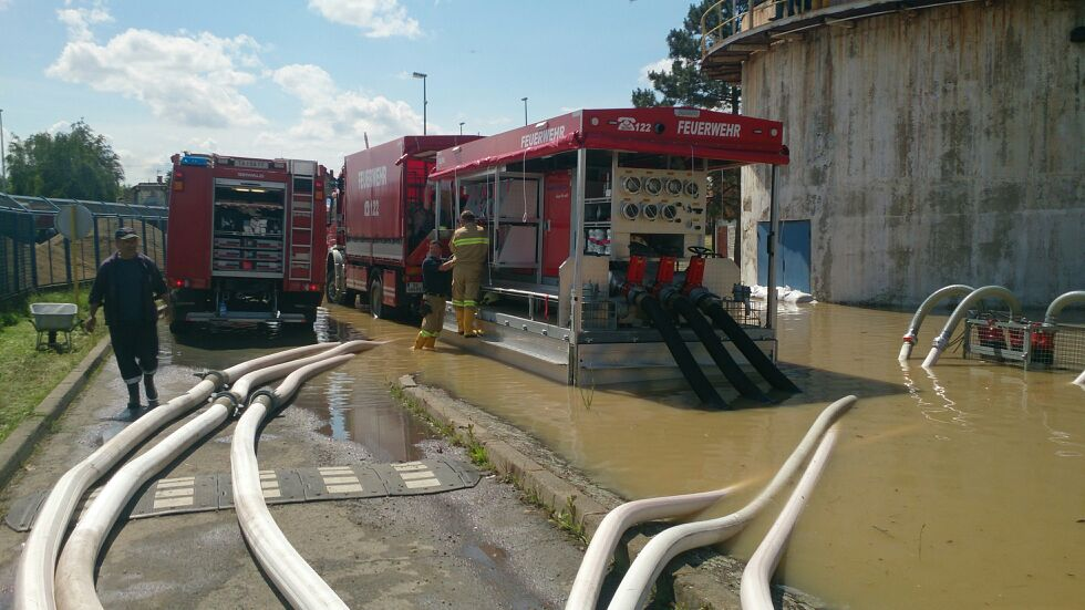 Hochleistungspumpe der österreichischen Feuerwehr während der Überschwemmungen auf dem Balkan 2014